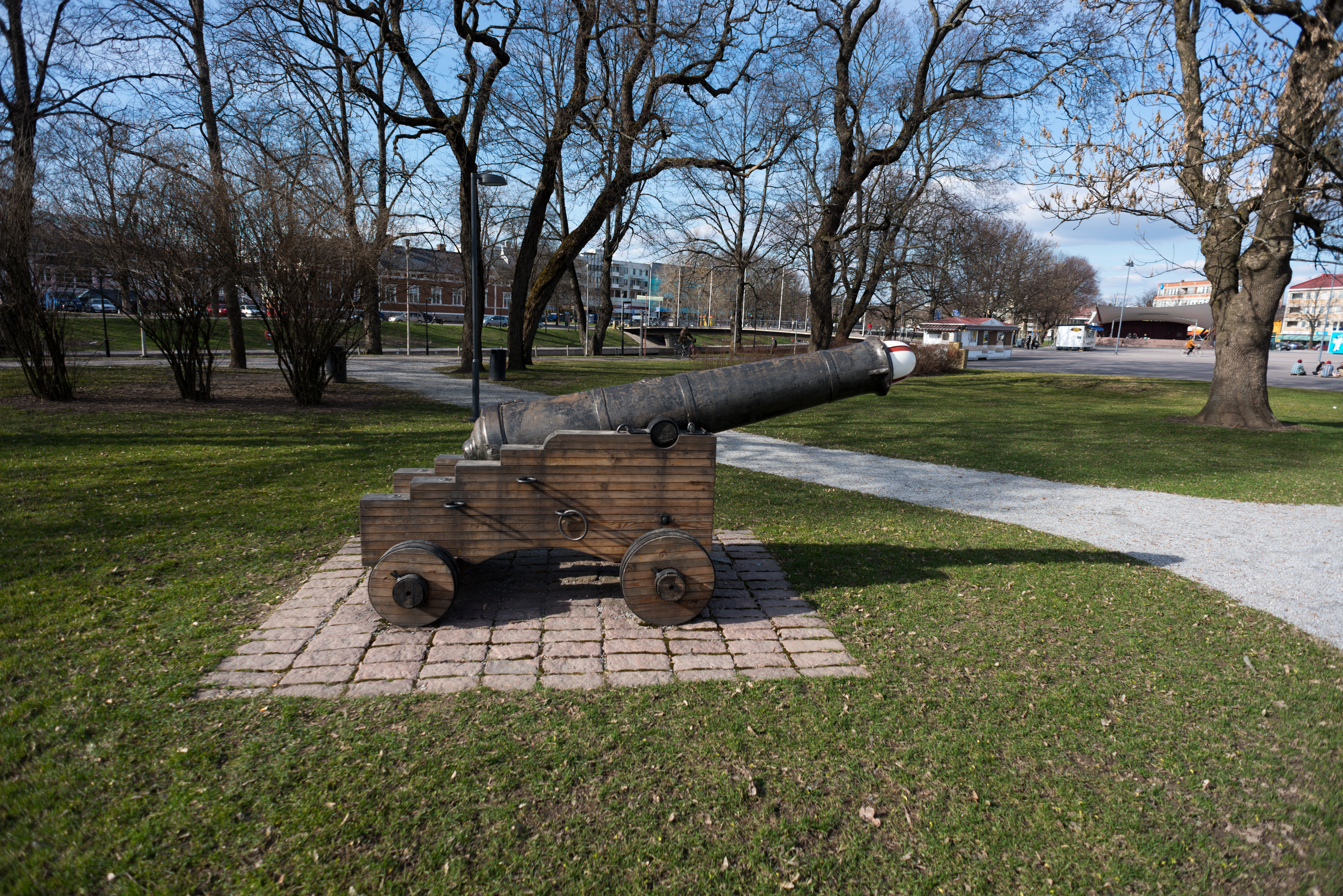 Torin tykki Horninpuisto Salo